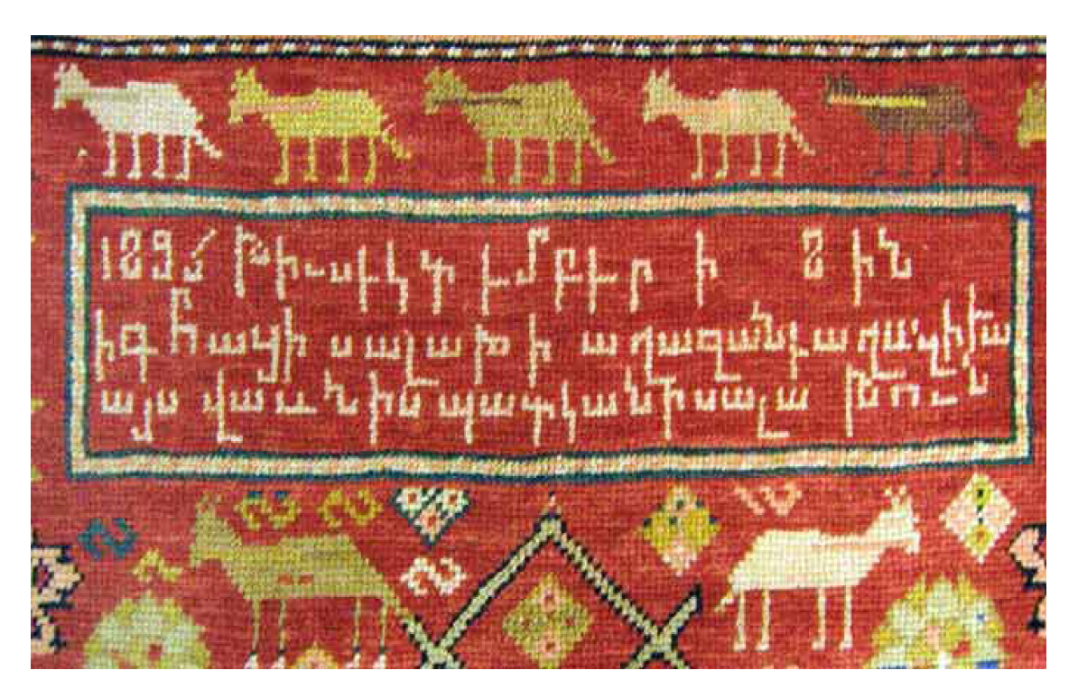 Фрагмент армянского ковра-завещания Armenian Karabagh inscribed rug.